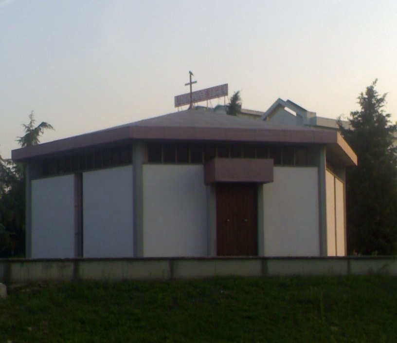 Chiesa dell'Autostrada di Montepulciano Stazione (Siena)